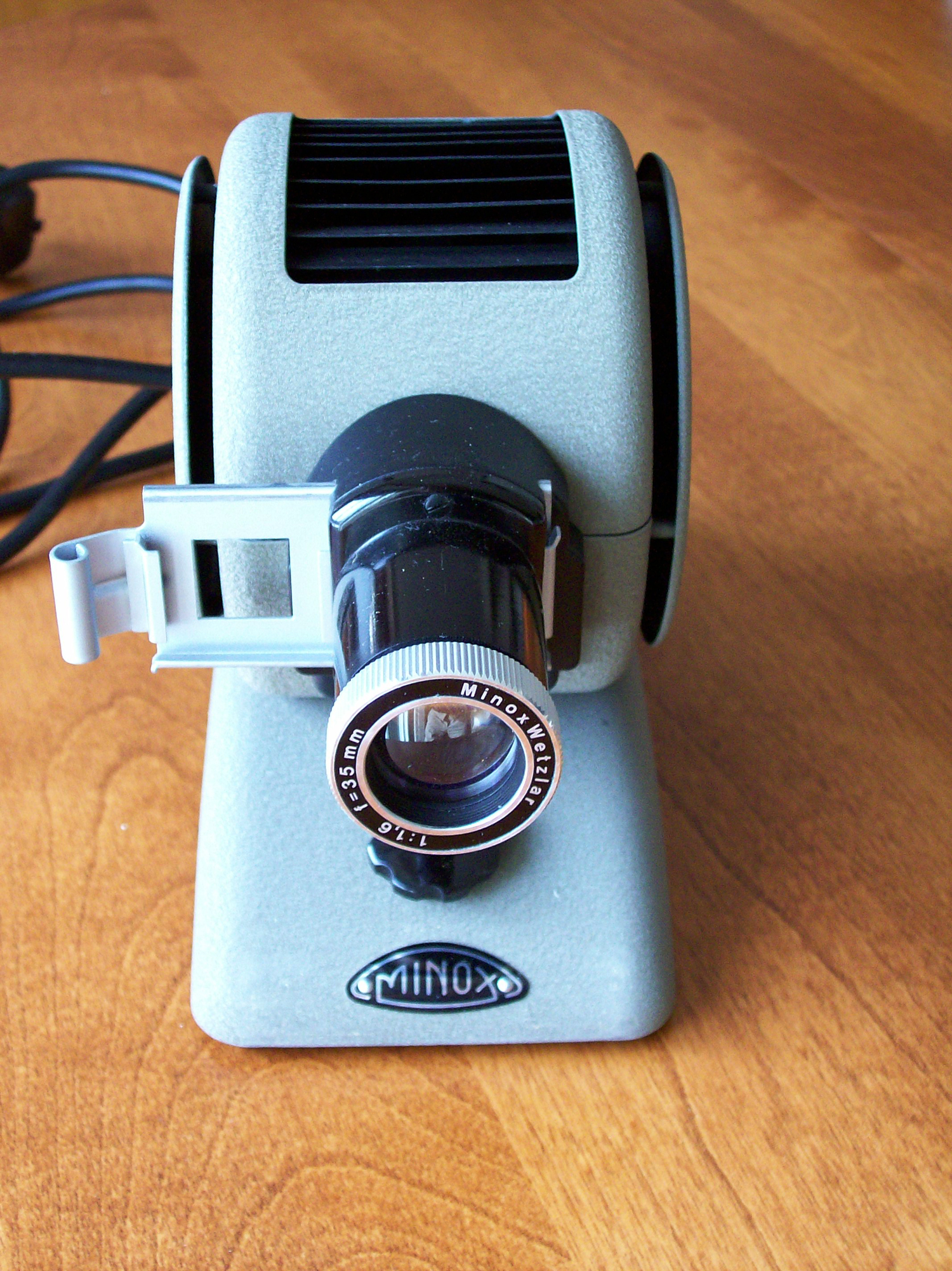 Minox slide projector 3001